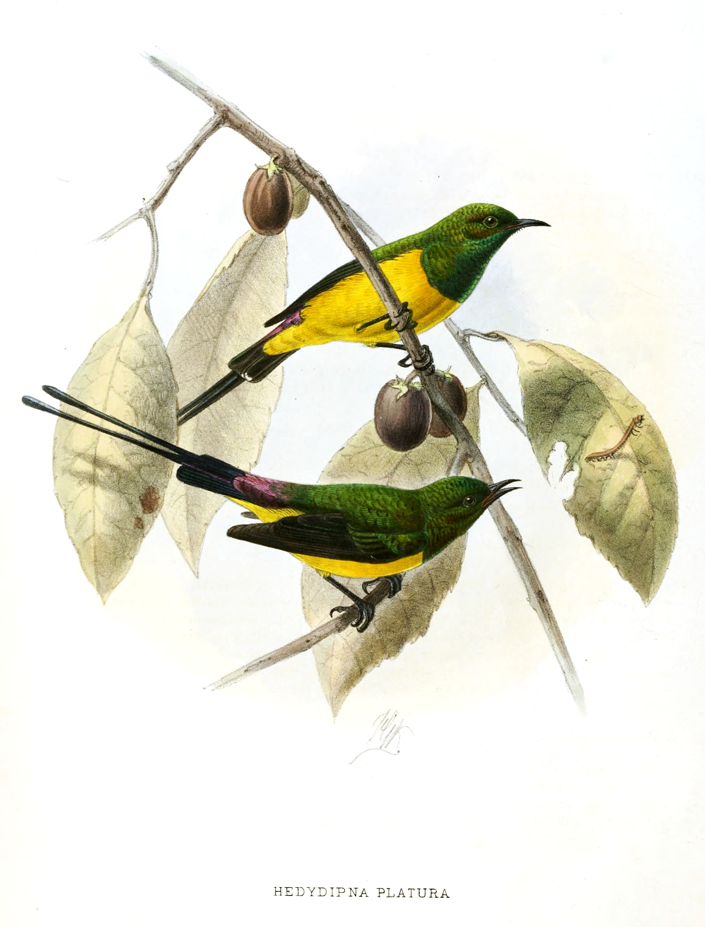 Hedydipna platurus